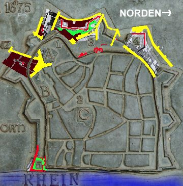 Bronzener Grundriss auf dem Bastionsbrunnen mit eingefügten Fundstellen nach Karte